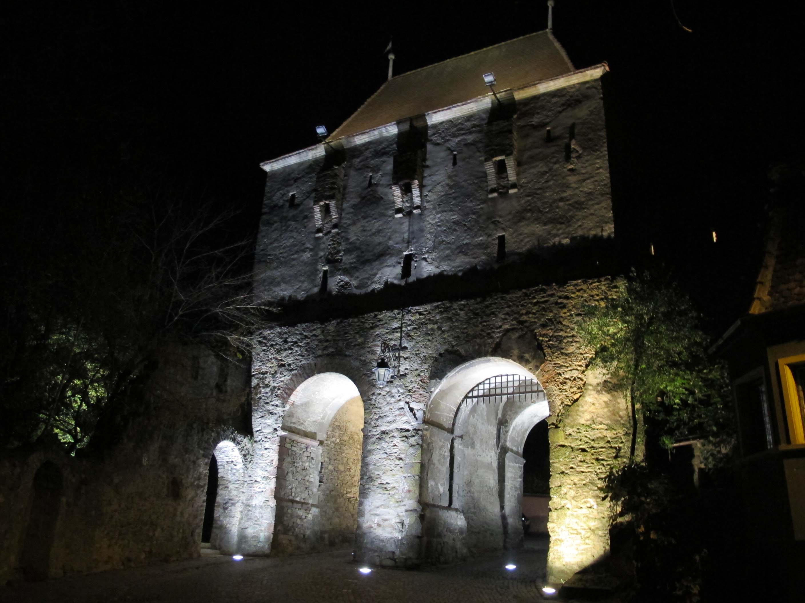 Sighisoara, torre dei sarti (crotorilor) di notte